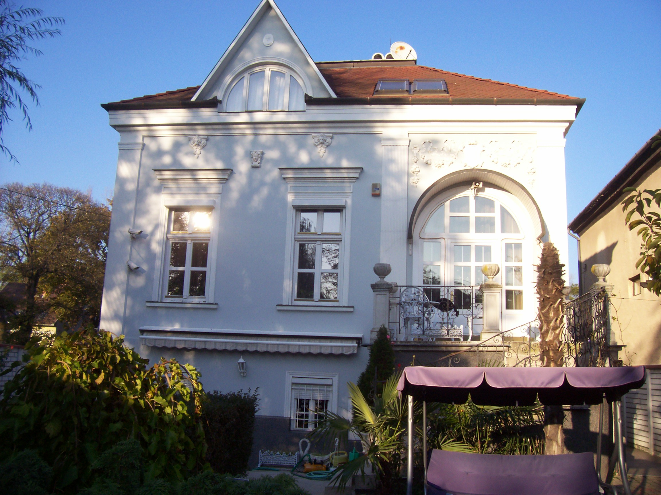 A mai IV. kerületi Vécsey Károly utca, a volt rákospalotai Villasor egyik villája, az Éber-Passuth villa